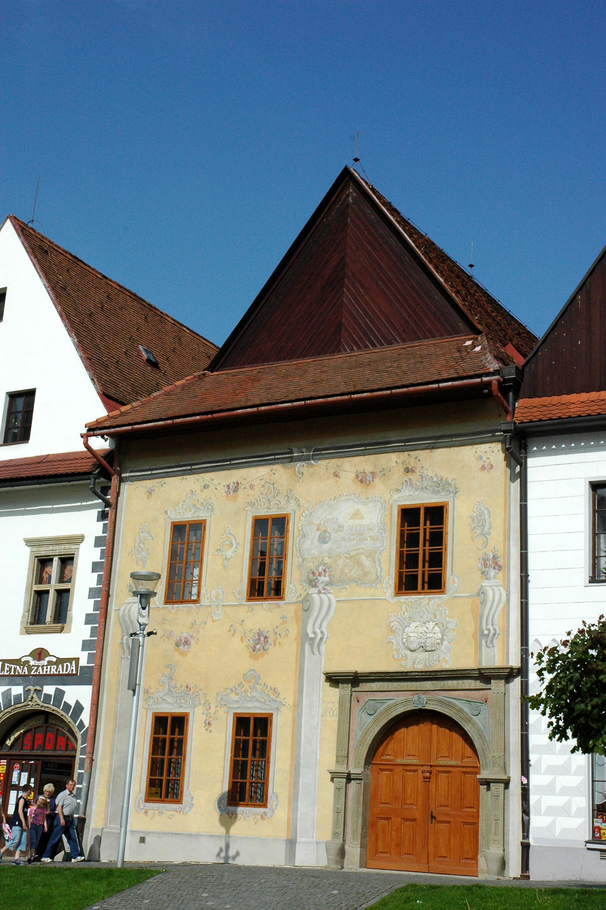 Bardejov